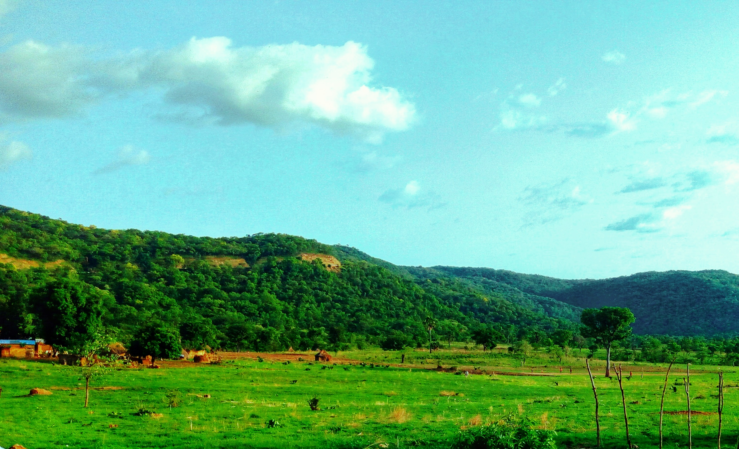 La falaise de Ngaoundere dans l'Adamaoua